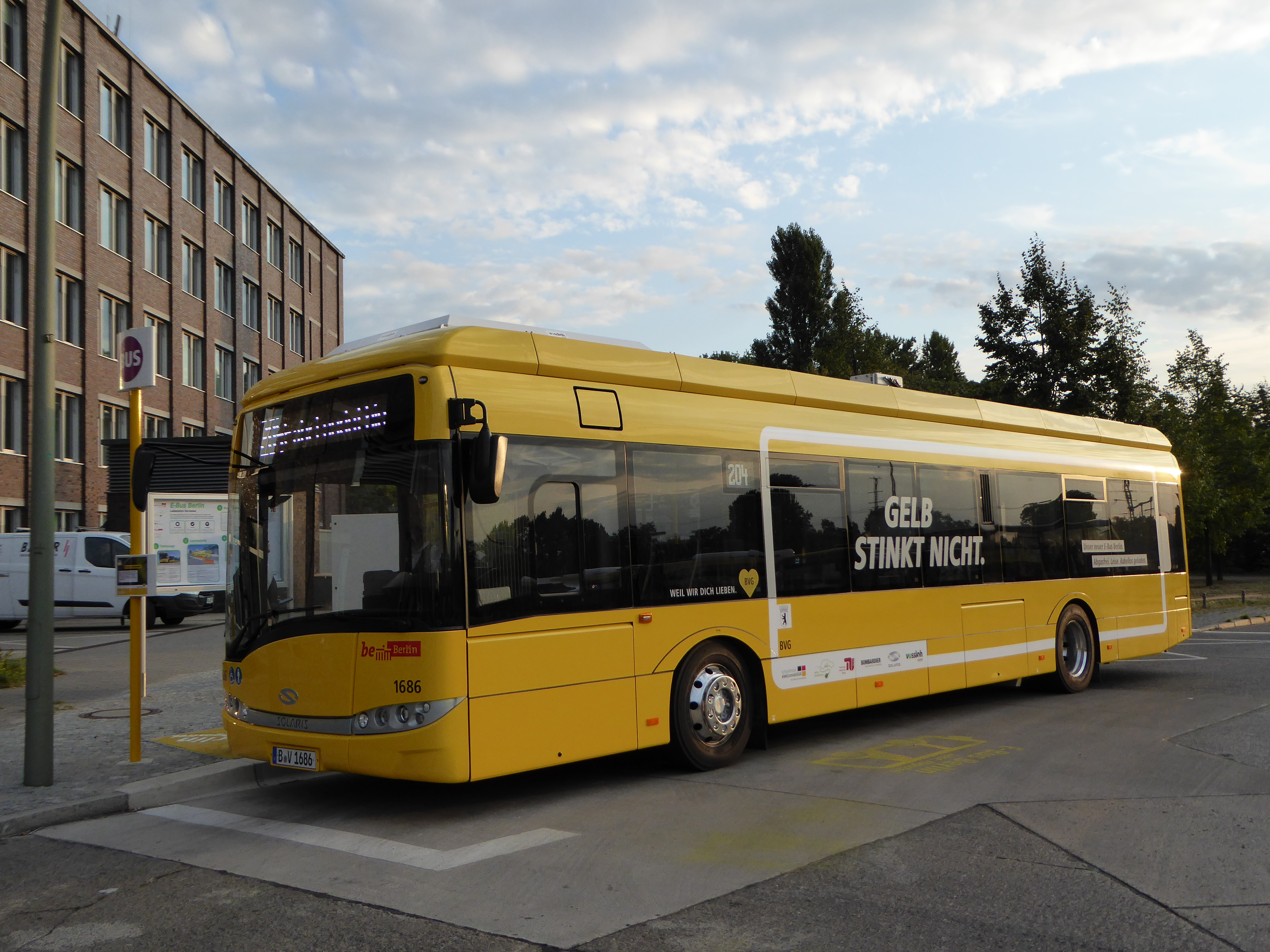 seit 31. August 2015: vier Elektrobusse im Linieneinsatz (Linie 204) auf 6 Kilometer langer Strecke: der Berliner Verkehrsbetriebe (BVG): Elektrobus: Solaris EN15 Urbino 12 electric mit dem induktiven Primove Ladesystem von Bombardier und Traktionsausrüstung von Vossloh Kiepe, die Aufladung erfolgt an den Endhaltestellen